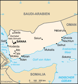 Karte des Jemen